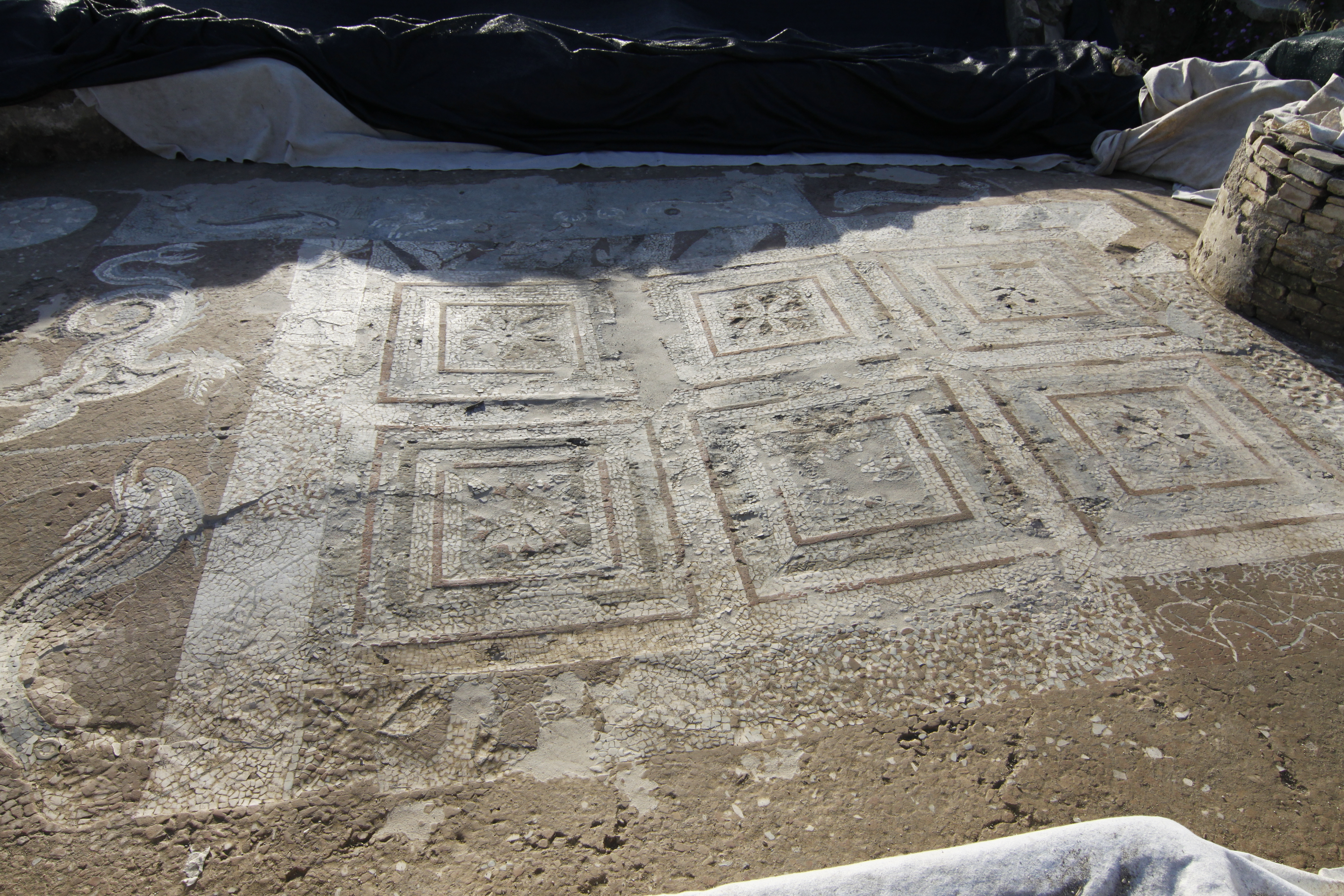 mosaico terme di Kaulon 1